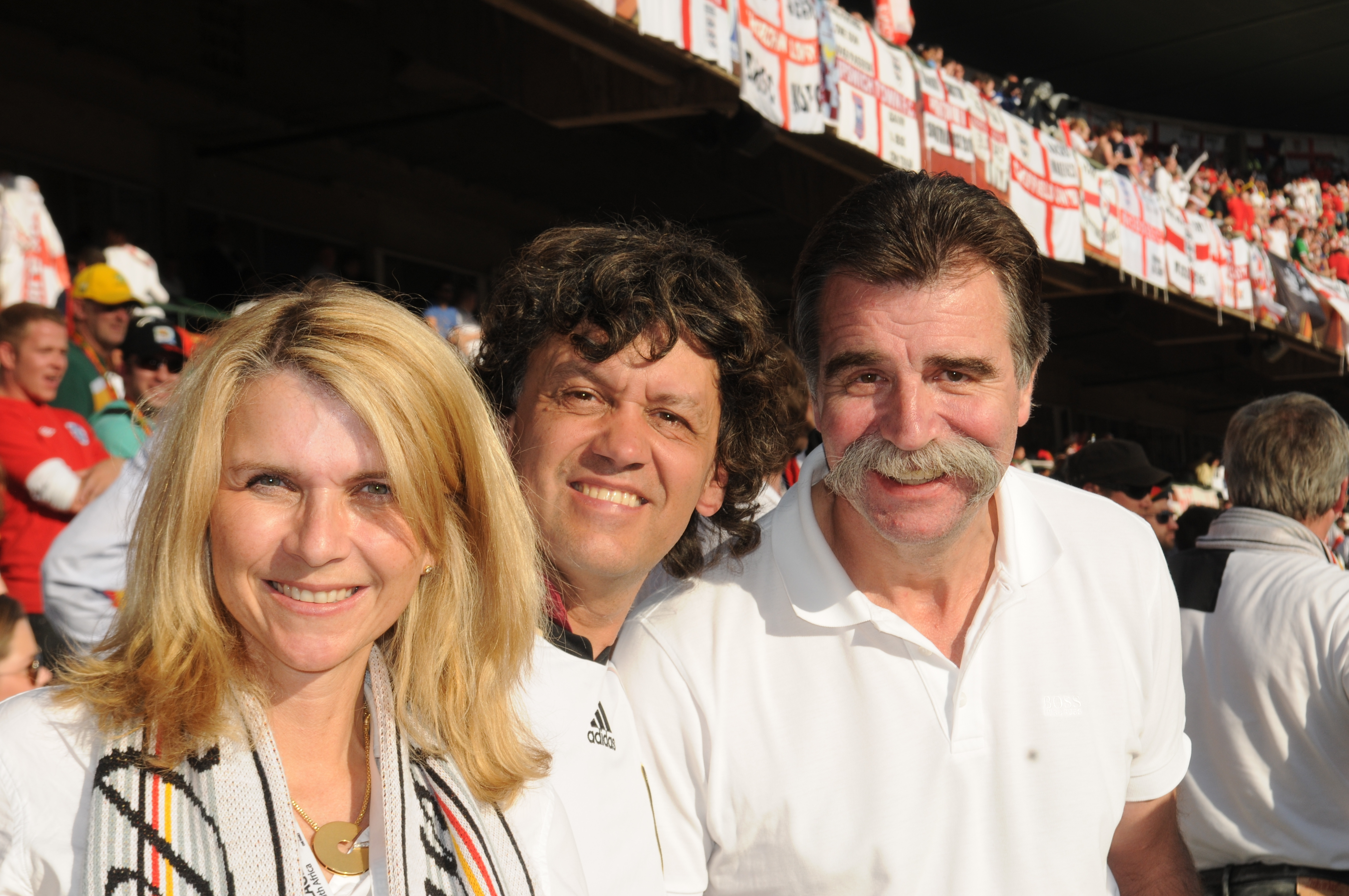 Petra Vieten, Wolfgang Vieten und Heiner Brand bei der Fußball-WM 2010 in Südafrika im Stadium in Bloemfontein beim Spiel Deutschland gegen England